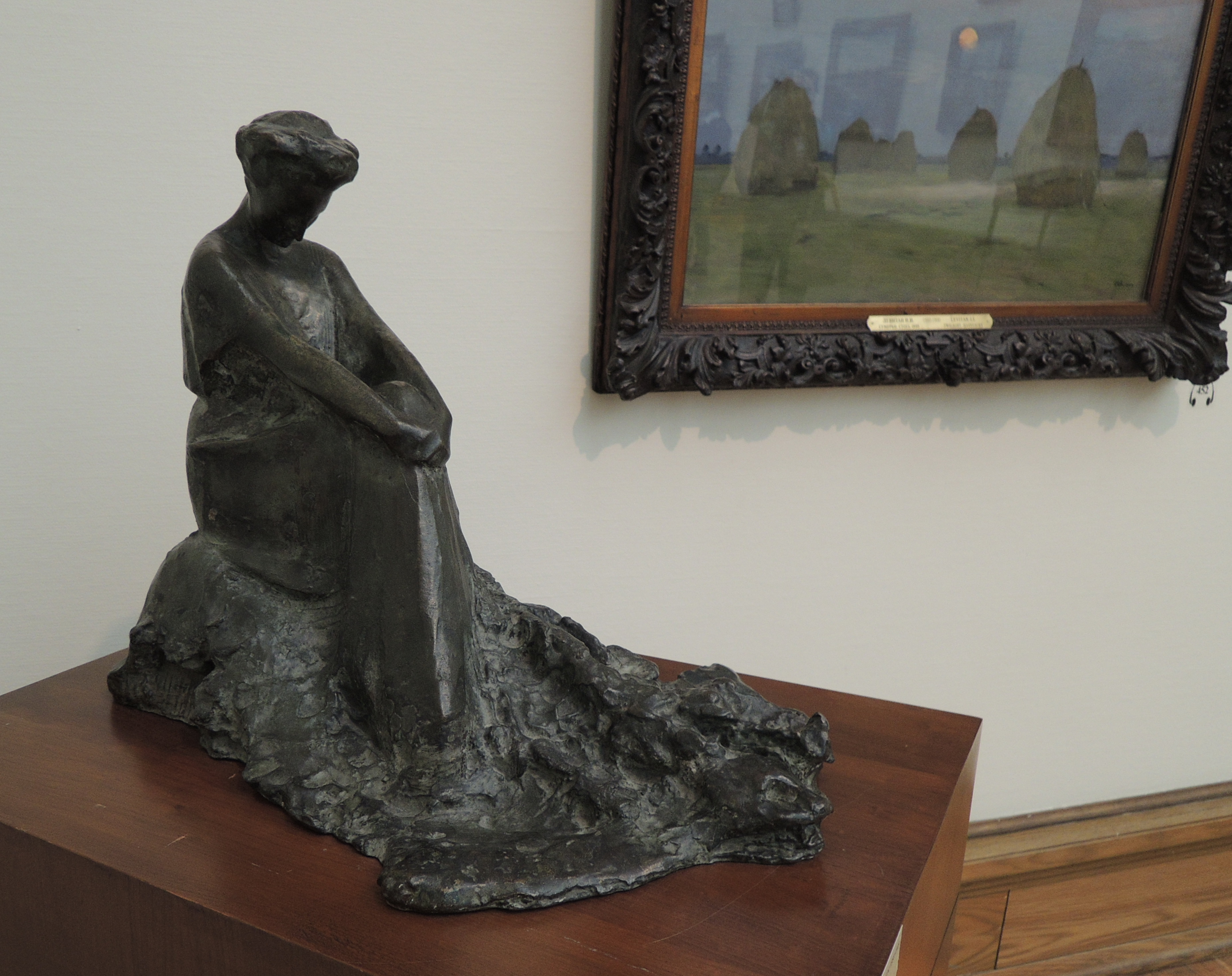 Константин Крахт. "Маргарита Морозова". 1905. ГТГ. Бронза